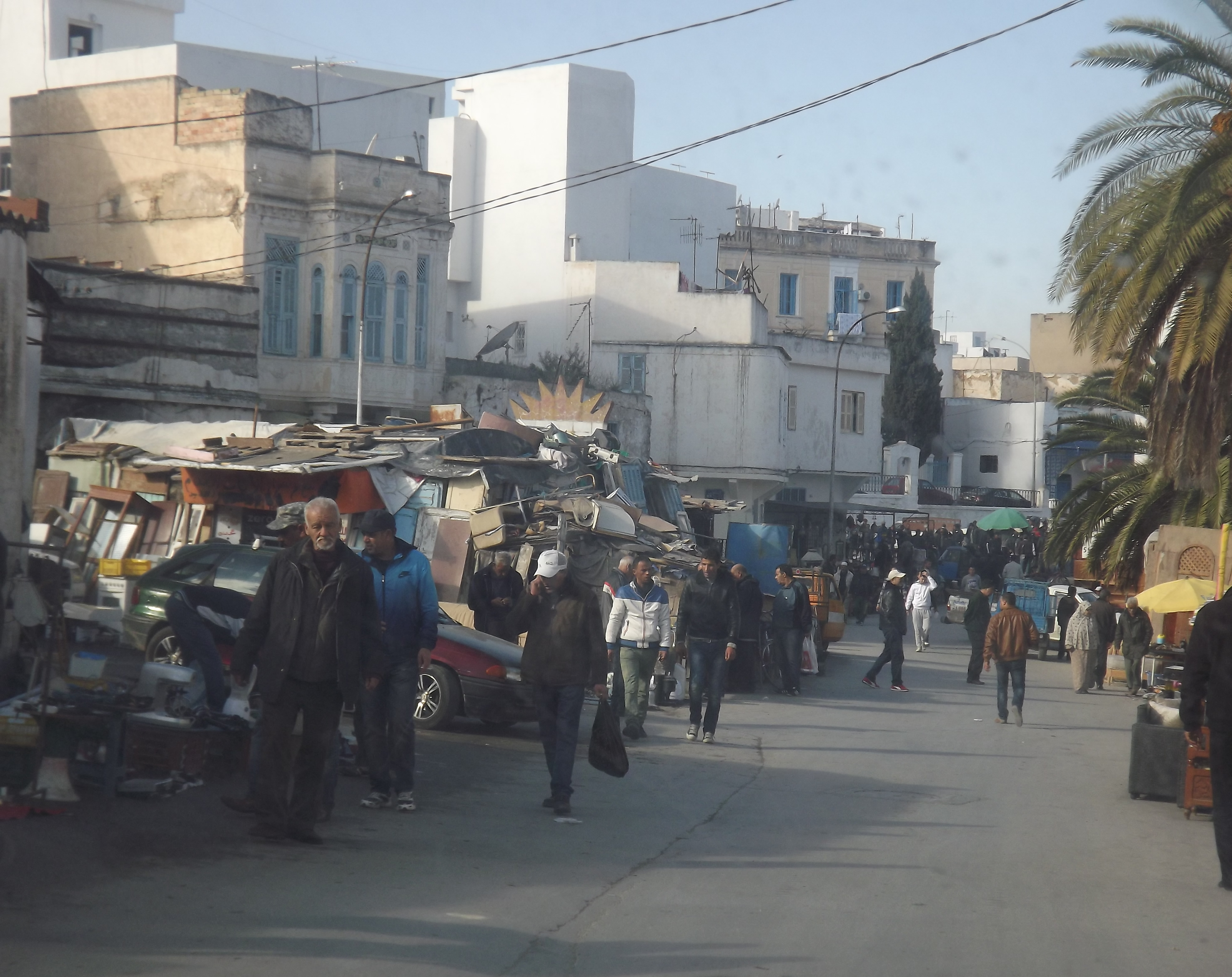 Souk el asser